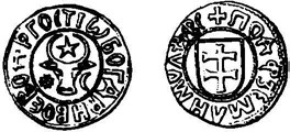 Groș din epoca lui Bogdan al III-lea